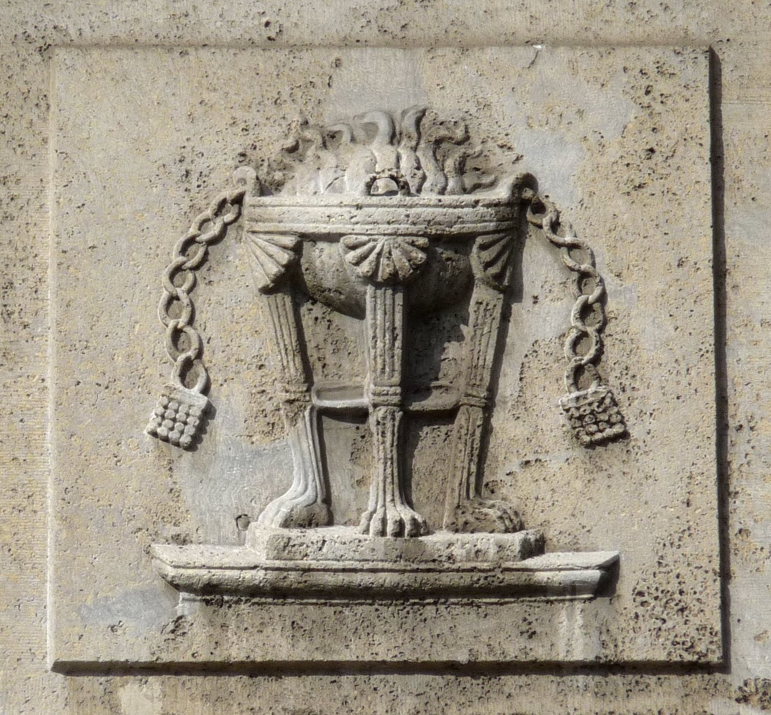 Lessing-Gymnasium in Berlin-Mitte, Fassadenrelief (Dreifuß)